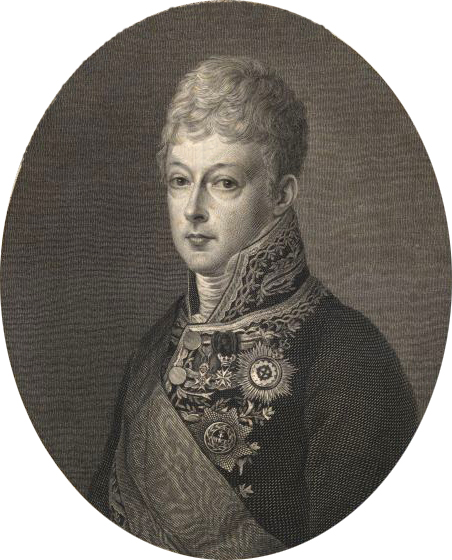 Pedro José Joaquim Vito de Meneses Coutinho, sexto marquês de Marialva.